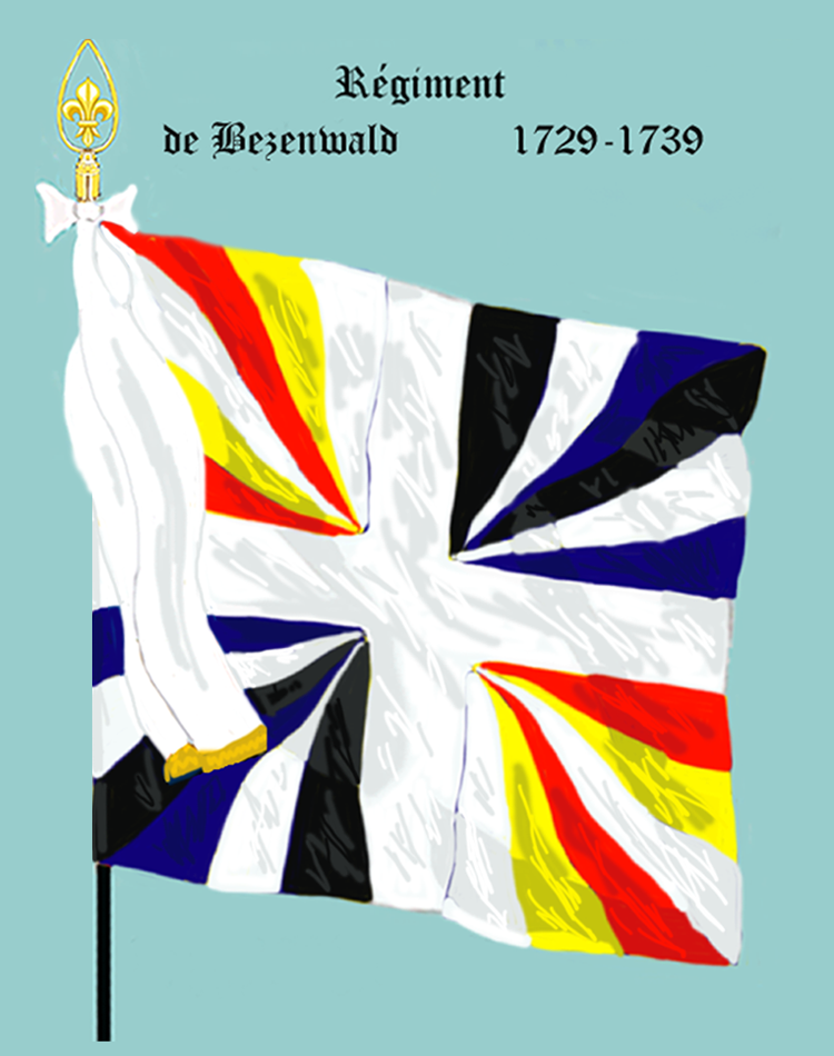 Ordonnanzfahne eines Fremdenregiments im königlich französischen Dienst. (Schweizer Regiment) - Entnommen und überarbeitet aus: „LES UNIFORMES ET LES DRAPEAUX DE L'ARMÉE DU ROI“ Marseille 1899. - Drapeau d'Ordonnance d' un régiment étranger au service française (régiment suisse.)